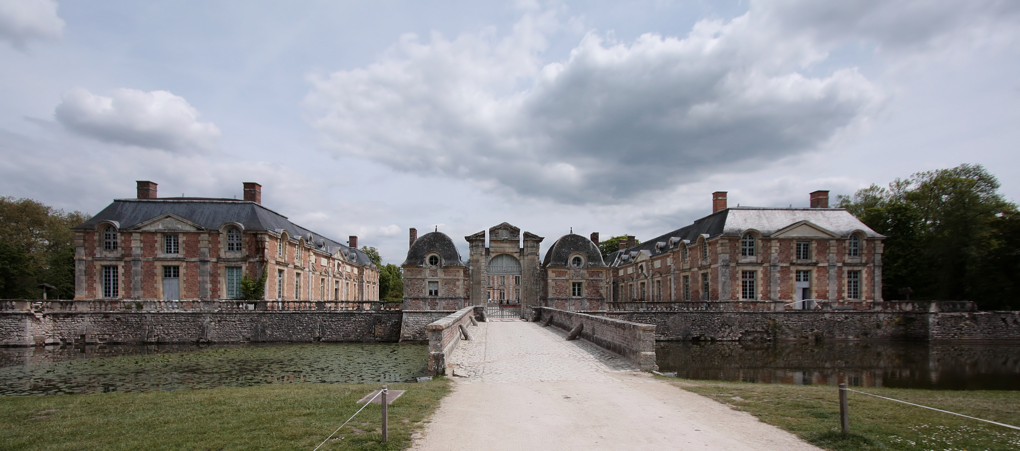 Schloss La Ferté-Saint-Aubin im Département Loiret/Frankreich - Zugang zur Schlossanlage